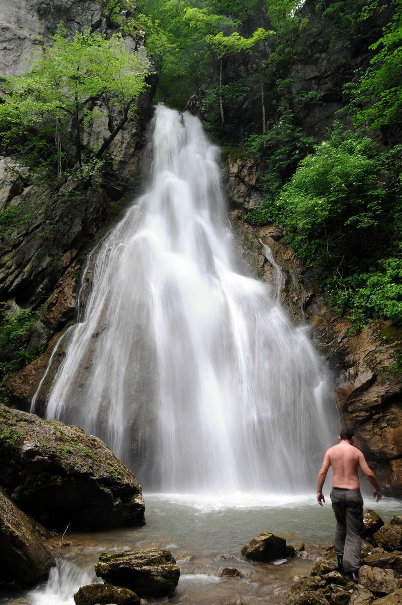 rijeka duboka vodopad skakavac Сликава е подигната во рамките на проектот „По трагата на душата 2015“.